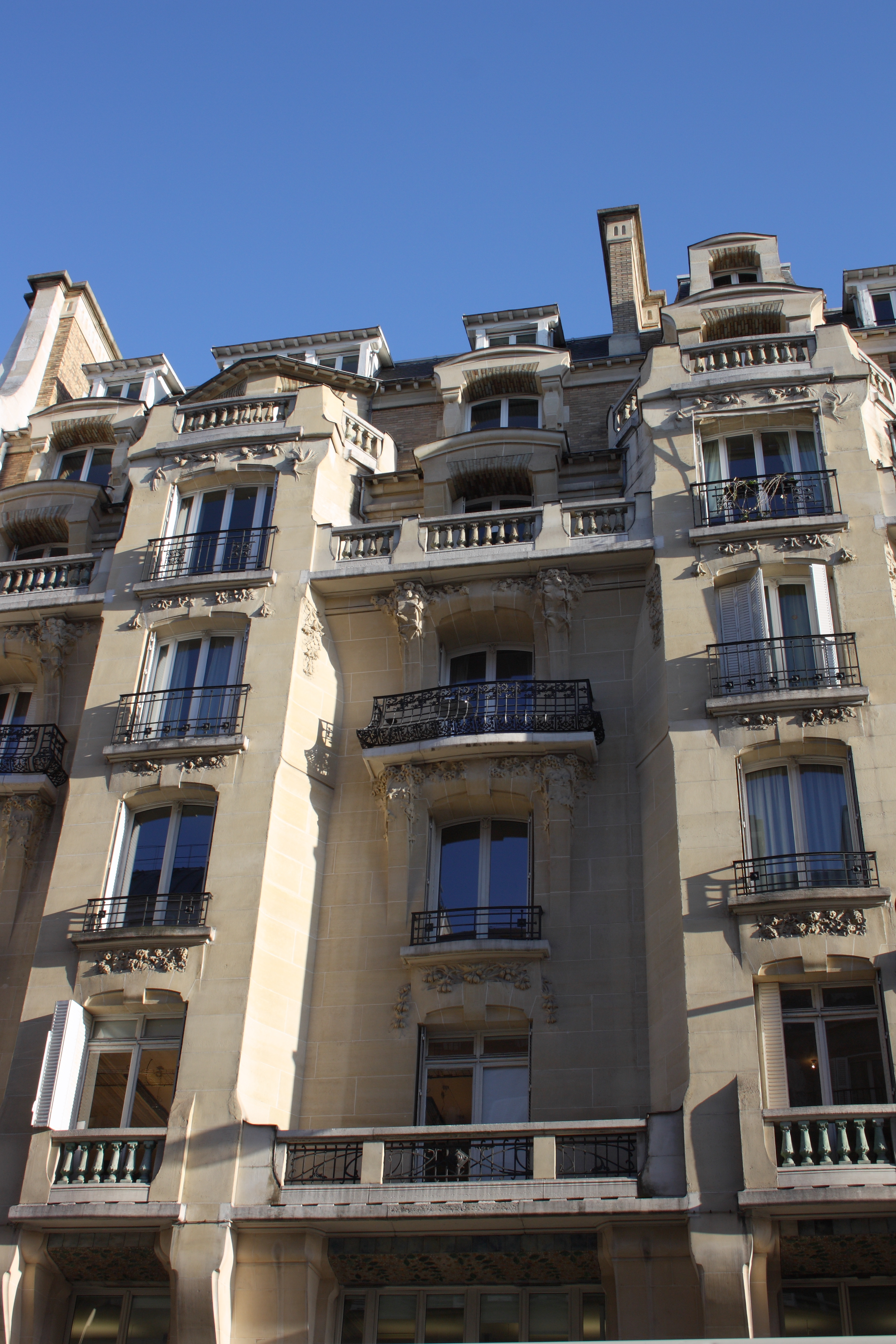 Ehemaliges Gebäude von La Semeuse de Paris, 16, rue du Louvre/rue Bailleul im 1. Arrondissement von Paris, 1912 von dem Architekten Frantz Jourdain für Ernest Cognacq errichtet